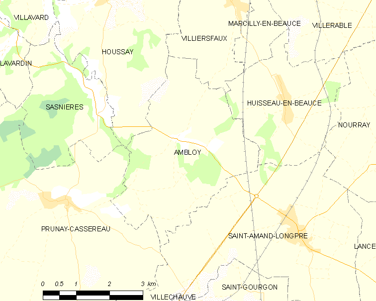 Carte des communes de France, centrée sur Ambloy (Loir-et-Cher, France, code Insee 41001)